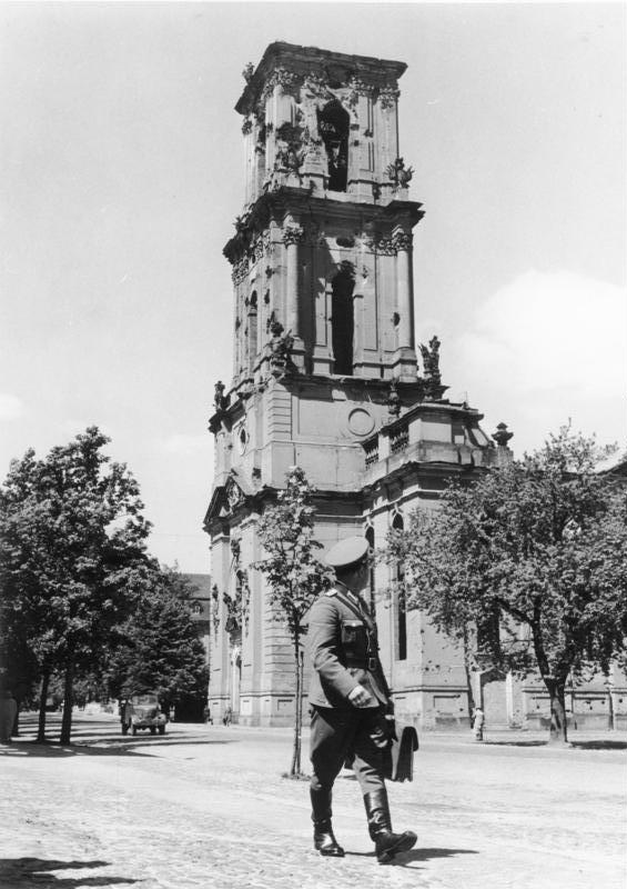 "Die ewige Garnison" heißt ein Filmbericht über das heutige Potsdam, den der Hessische Rundfunk am 28. August um 20.30 Uhr im Deutschen Fernsehen sendet. Unser Bild zeigt die Garnisonkirche in Potsdam, im Vordergrund ein Offizier der sowjetzonalen "Volksarmee" [vermutlich Offizier der Volkspolizei]